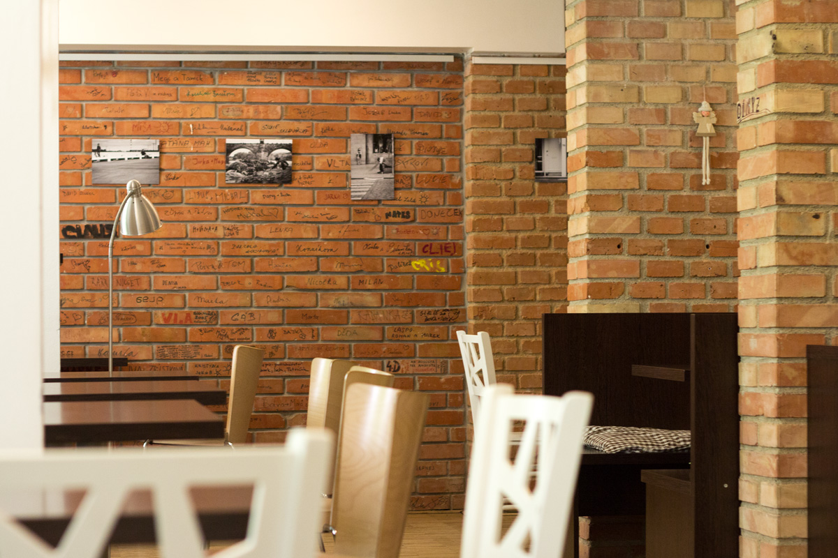 Kavárna Anděl, Brno, Gorkého 34